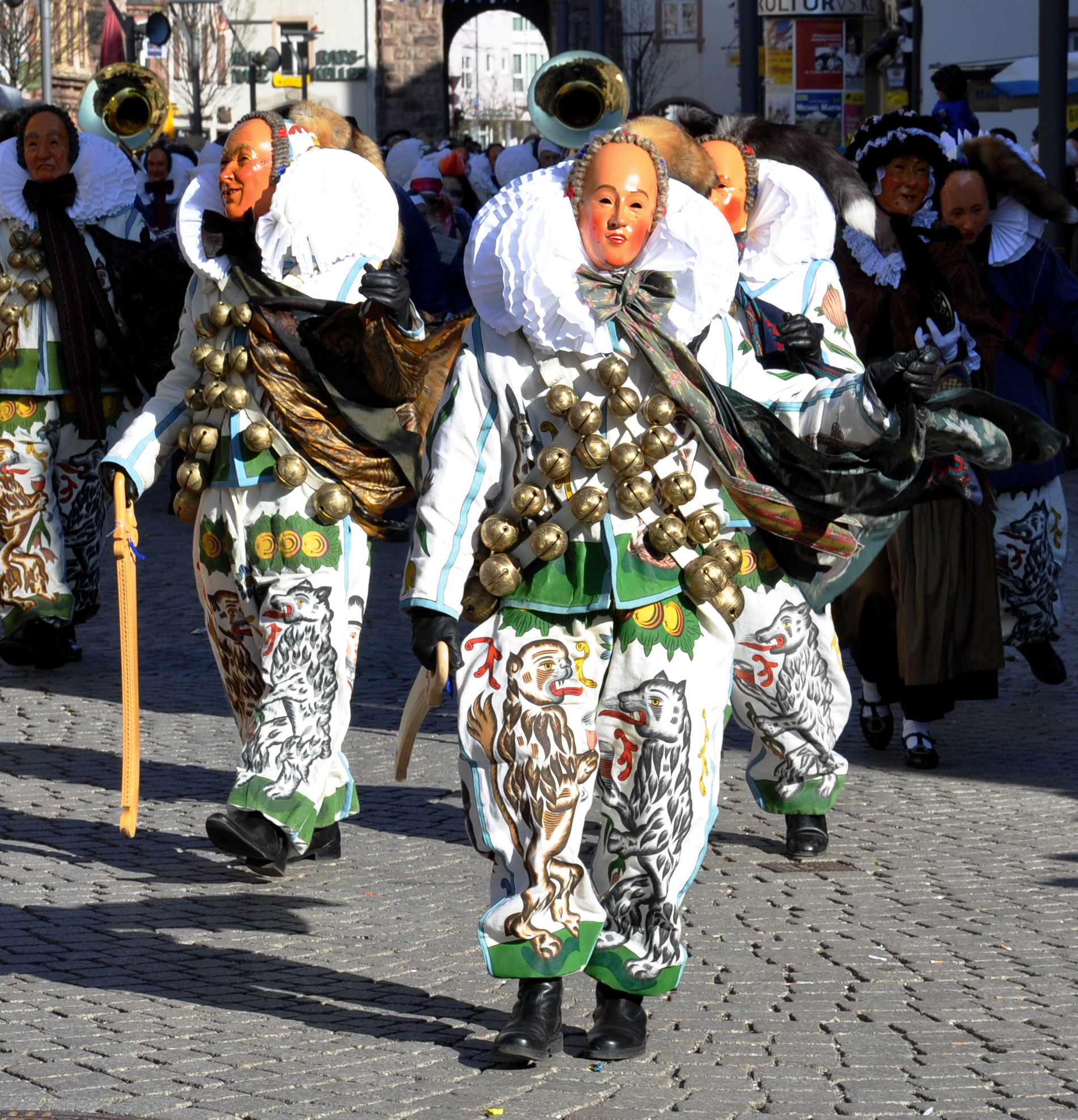 Historischer Umzug der Narrozunft Villingen, Fasnetsmontag 2011 Narros